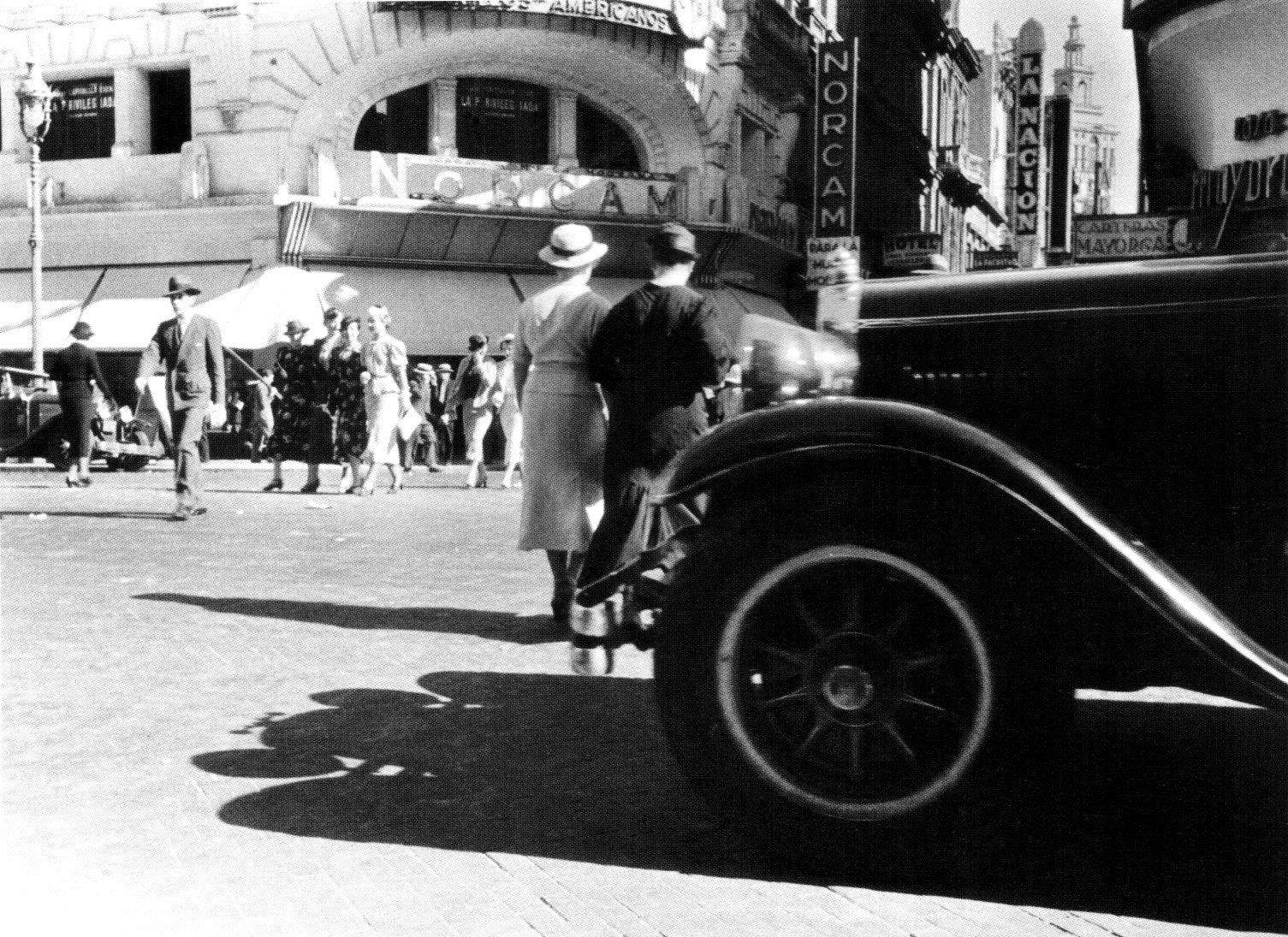 Intersección de Florida y Corrientes, Buenos Aires, 1936. En la fotografía se aprecian las esquinas correspondientes a la vereda par de Corrientes.